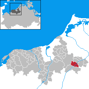 Tessin in Mecklenburg-Western Pomerania - District Bad Doberan